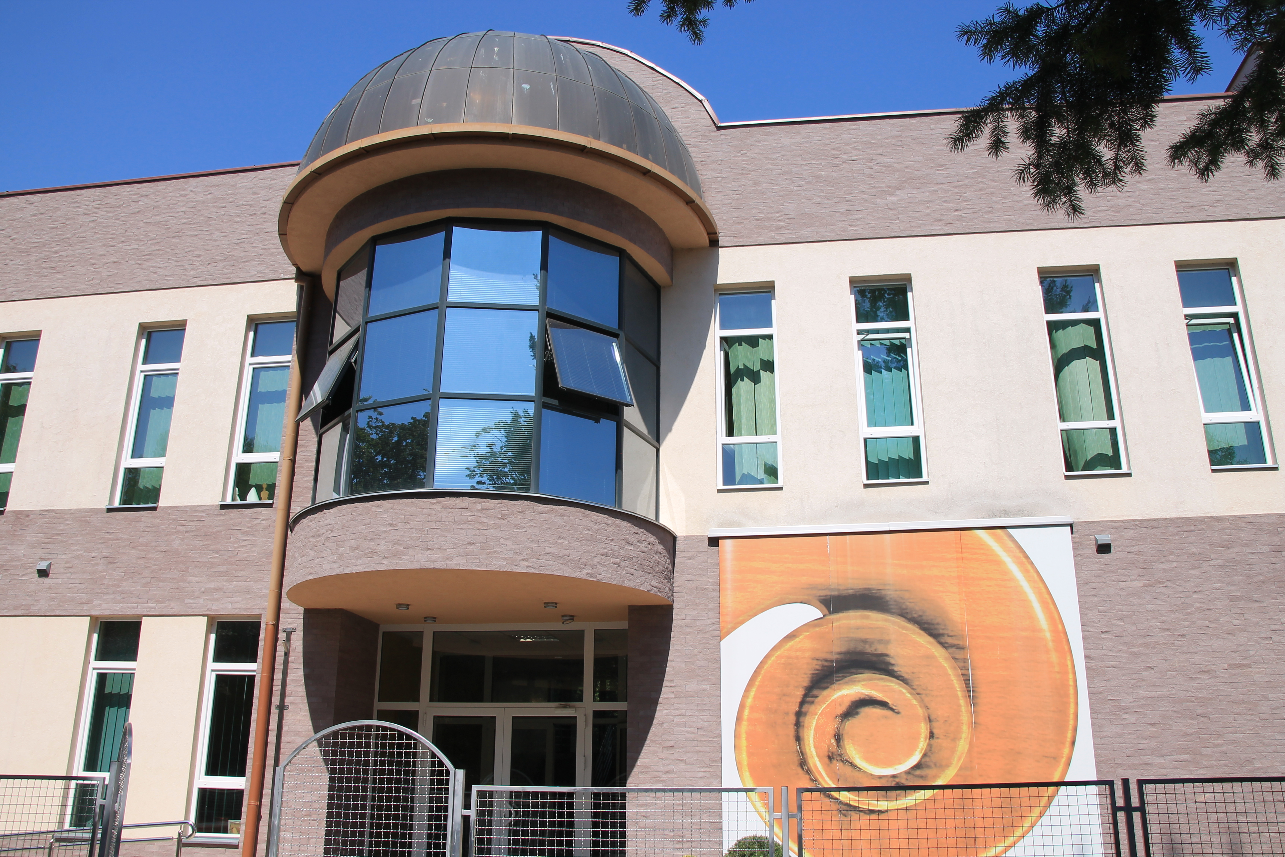 Muzička škola Čačak